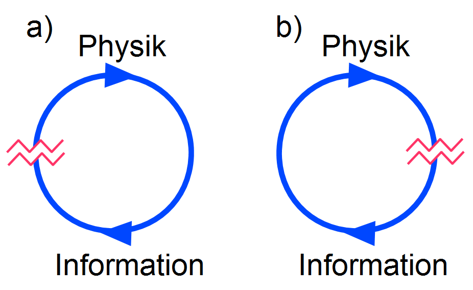 Zusammenhang zwischen Information und Physik nach Grinbaum. a) Die Verarbeitung von Information basiert auf den Gesetzen der Physik. Physik ist grundlegend, Information ist ein abgeleitetes Konzept. b) Die grundlegenden Prinzipien der Physik sind informationstheoretischer Natur.